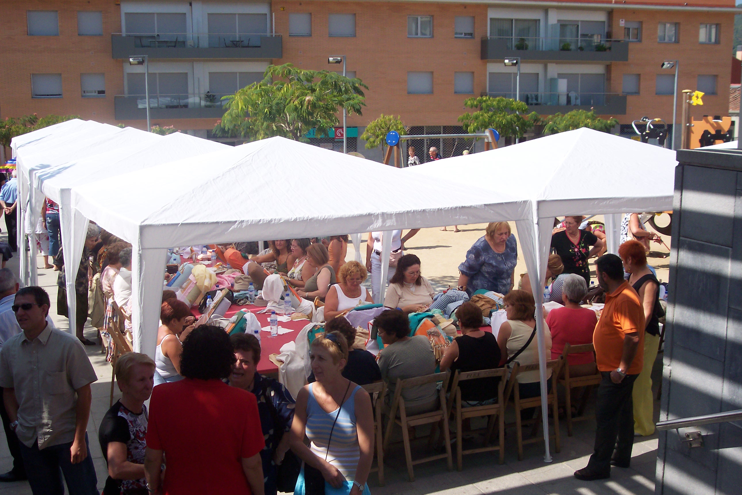 2006 Trobada de Puntaires in Castellar del Vallès